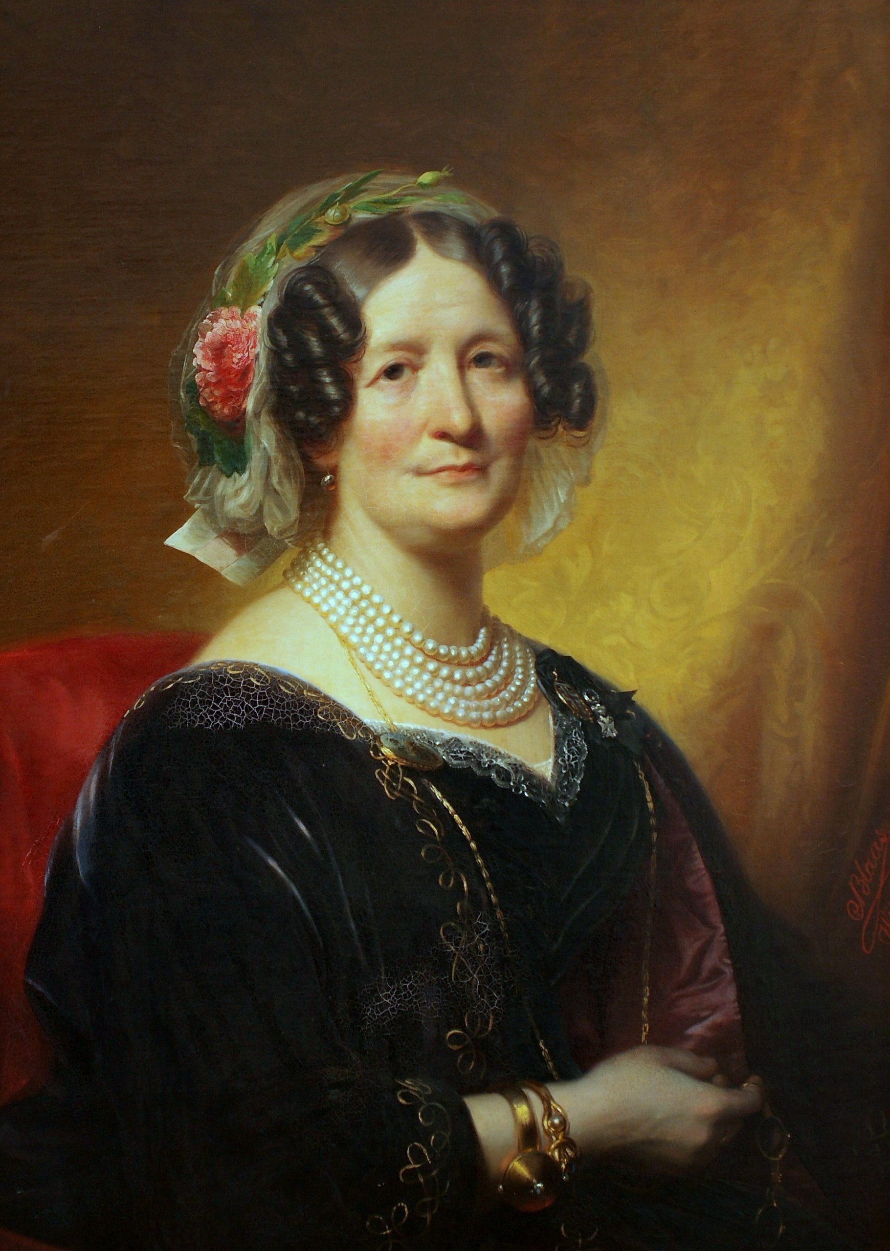 Helena z Lubomirskich Mniszkowa (1784-1876)